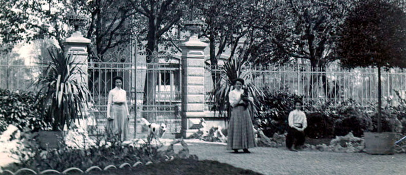 De drie dochters van Maxime Regout (1864-1906) en Anna Rutten (1865-1917) vóór de villa van hun ouders aan de Sint Lambertuslaan 8 in het Maastrichtse Villapark. V.L.N.R.: Theodosie Regout, later Van Heijst-Regout (1892-1973), Anne Regout (1889-1981) en Adrienne Regout, later Brouwers-Regout (1895-1975). Fotocollectie RHCL Maastricht, GAM 3850.